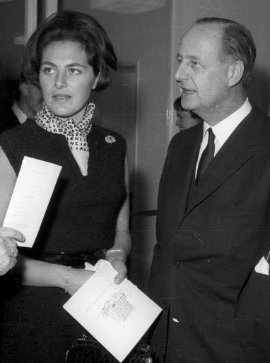 Im Bild v.l.n.r.: Prof. Diedrich Schroeder von der Landwirtschaftlichen Fakultät, Maja Oetker, Unternehmer Rudolf August Oetker, Prorektor Prof. Erich Bagge.